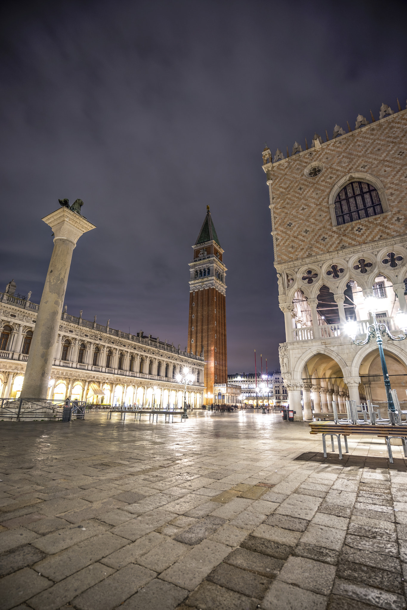 500px provided description: Piazza San Marco in una notte di inizio Dicembre [#night ,#italy ,#venezia ,#nikon ,#photo ,#500px ,#venice ,#canon ,#italia ,#long exposure ,#photography ,#tamron ,#sigma ,#flickr ,#san marco ,#nightscape ,#mirrorless]